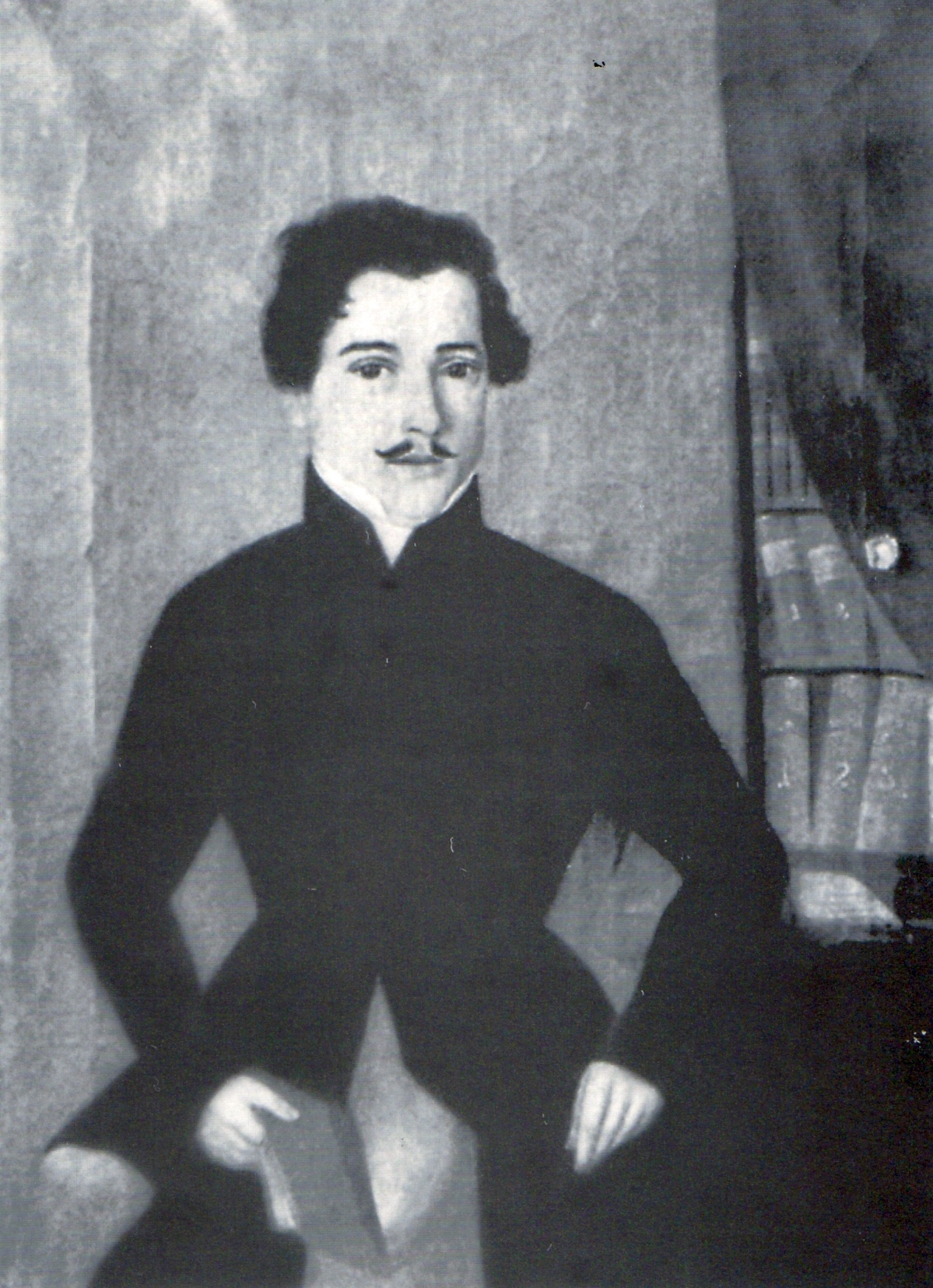 Portretul lui Grigore Pleșoianu (n. 30 ianuarie, 1808, Cerneți - d. 30 ianuarie 1857) a fost un traducător și profesor român. A fost fiul lui Paraschiv Pleșoianu, provenit dintr-o familie de boieri olteni, și al Elisabetei (n. Greceanu). A studiat la Colegiul Sfântul Sava din București unde i-a avut ca profesori pe Gheorghe Lazăr și Ion Heliade-Rădulescu. Grigore Pleșoianu împreună cu Stanciu Căpățâneanu, a pus bazele Școlii Centrale din Craiova. A fost profesor al acestei școli în perioada 1826 - 1836, după care s-a stabilit la Cerneți unde a îndeplinit funcția de inginer hotarnic. A colaborat cu Curierul Românesc și a avut o bogată activitate publicistică. A scris: Abecedar greco-român (1825); Abecedar înlesnitor pentru învățătura copiilor după D. Fournier (1828); Cele dintâi cunoștințe (1828) - închinată domnitorului Alexandru Dimitrie Ghica; Aneta și Luben după Jean-François Marmontel (1829); Limba franțuzească și ortografia ei (1830); Gramatica franțezo - română (1830); Frumoase dialoguri franțeze - române (1830); Engalpion de aur sau Deslușirea înțelesului icoanei lui Chevit Tebeanul (1833); Abețedar franțezo - român (1833); Calendarul pe anul 1834; Copilul pierdut și Licuriciul - traducere din franceză după Christoph von Schmid (1838); Columb - traducere din franceză după Christoph von Schmid (1839); Canarul - traducere din franceză după Christoph von Schmid (1840).[1]